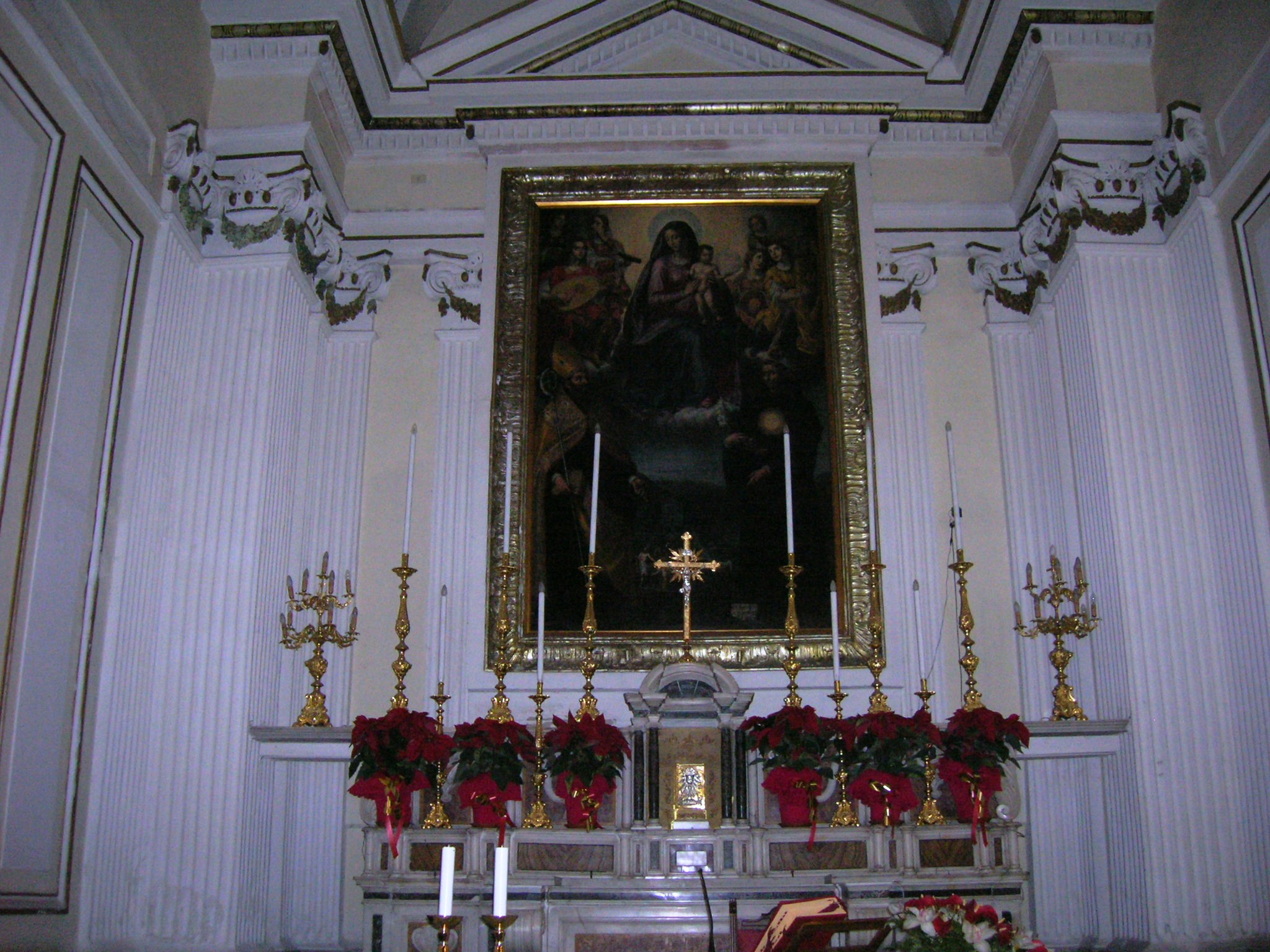 La chiesa di Santa Maria dell'Orto a Castellammare di Stabia